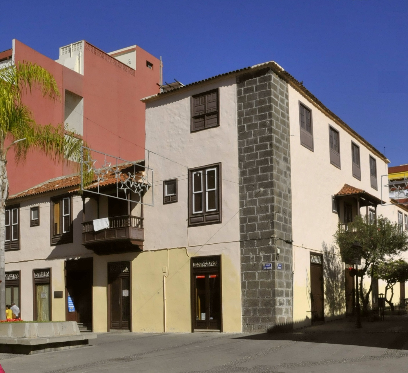 Puerto de la Cruz, Casa Iriarte, Geburtshaus von Juan Iriarte und seiner Neffen Tomás, Bernardo und Domingo